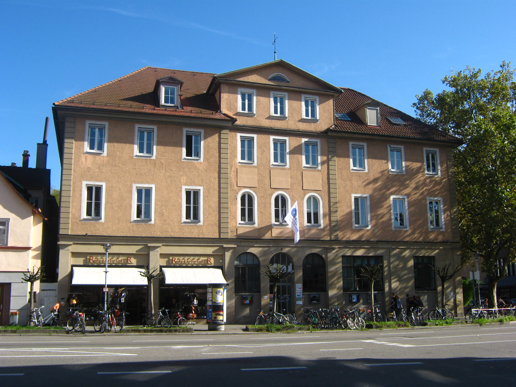 Haus Karlstraße 3, in dem sich u.a. das Deutsch-Amerikanisches Institut Tübingen befindet.